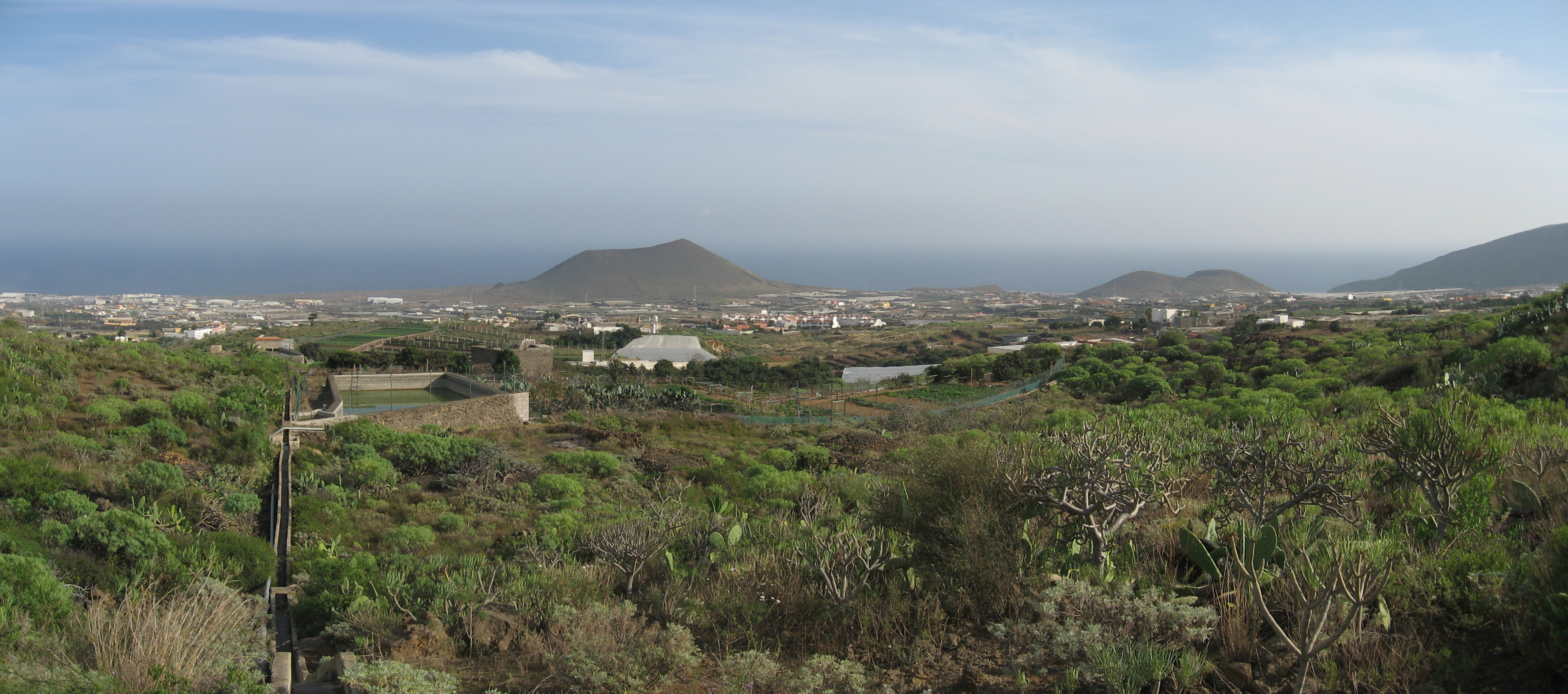 Güímar, Tenerife, Canarias, España